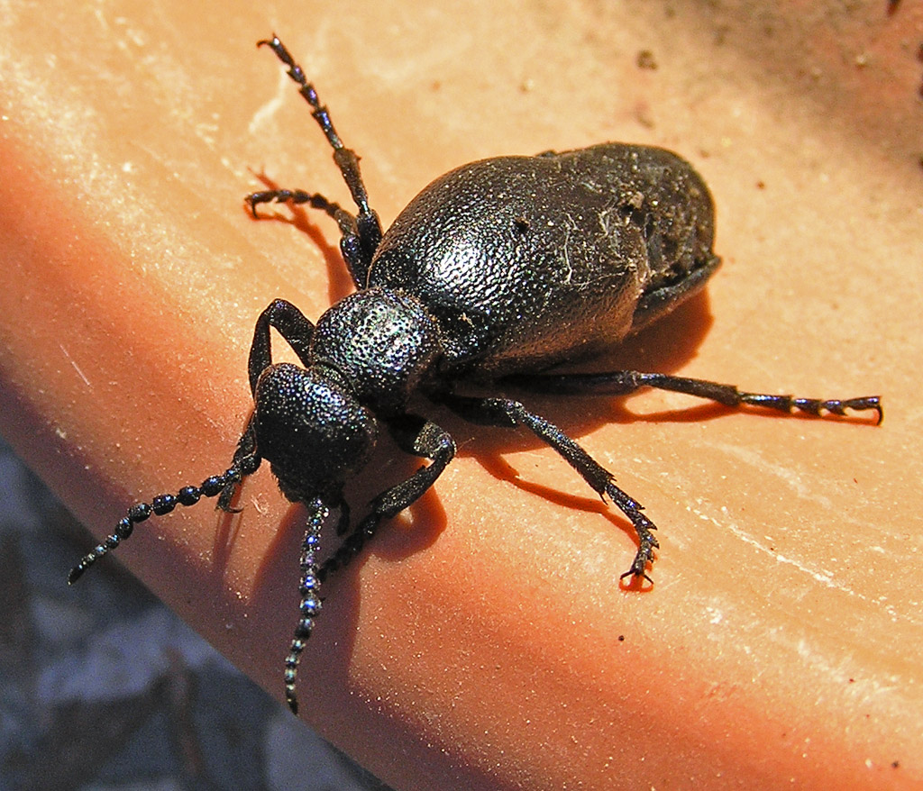 Beschreibung: Ölkäfer Meloë proscarabaeus Fotograf: Darkone, 3. April 2005